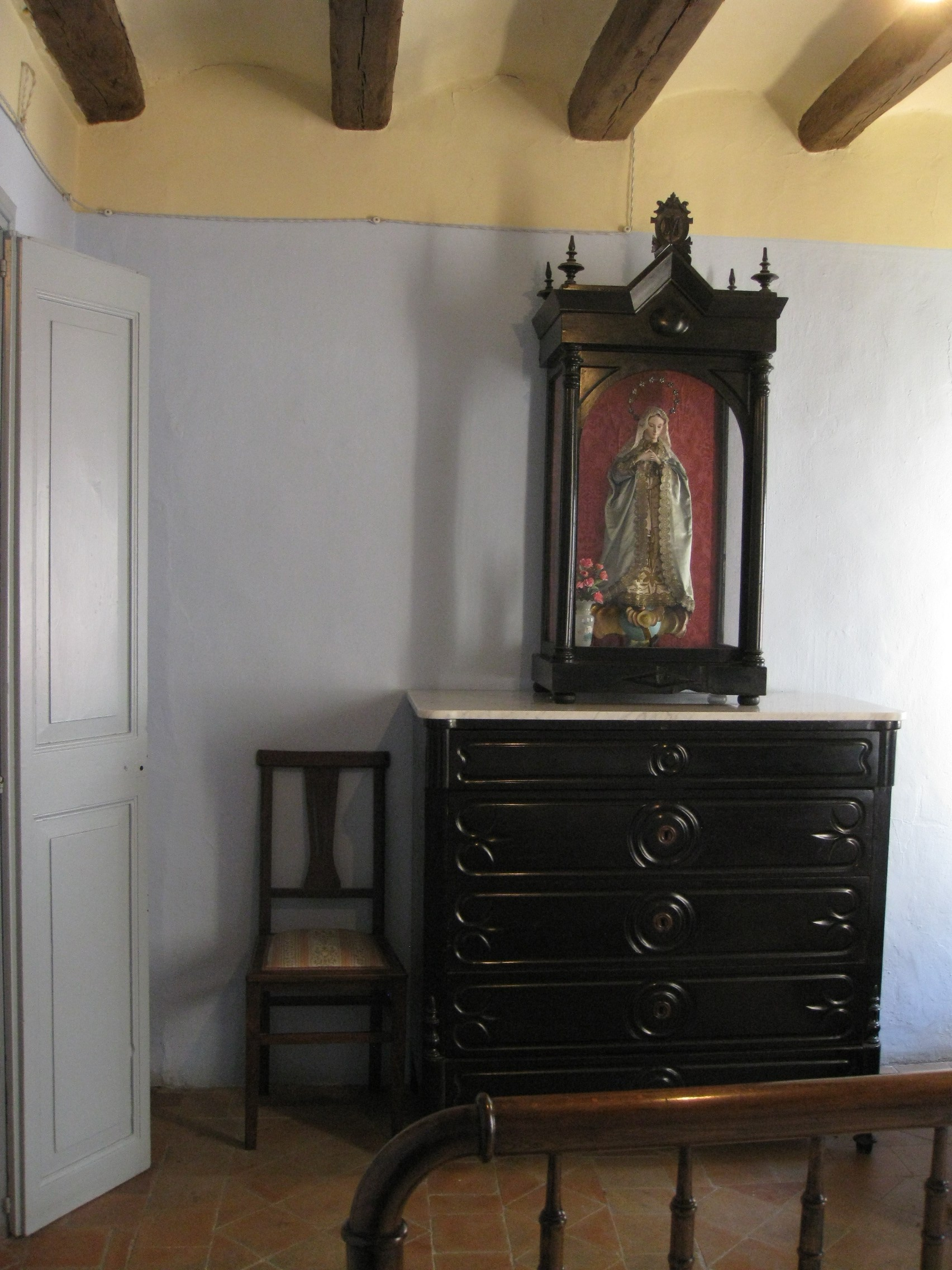 Casa nadiua de Pau Casals (el Vendrell)